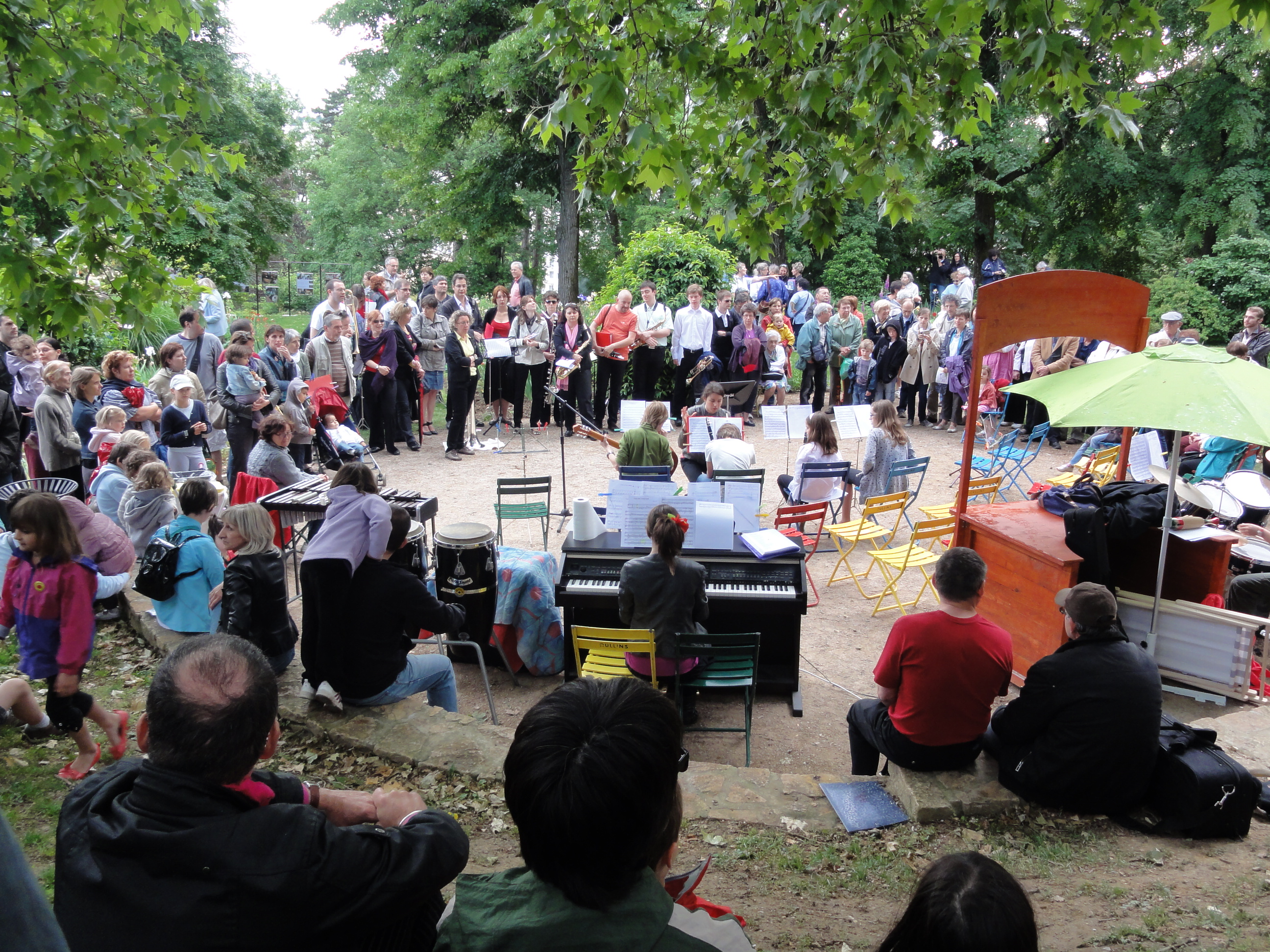 Spectacle lors de la Fête de l'iris d'Oullins (en mai) dans le parc Chabrières